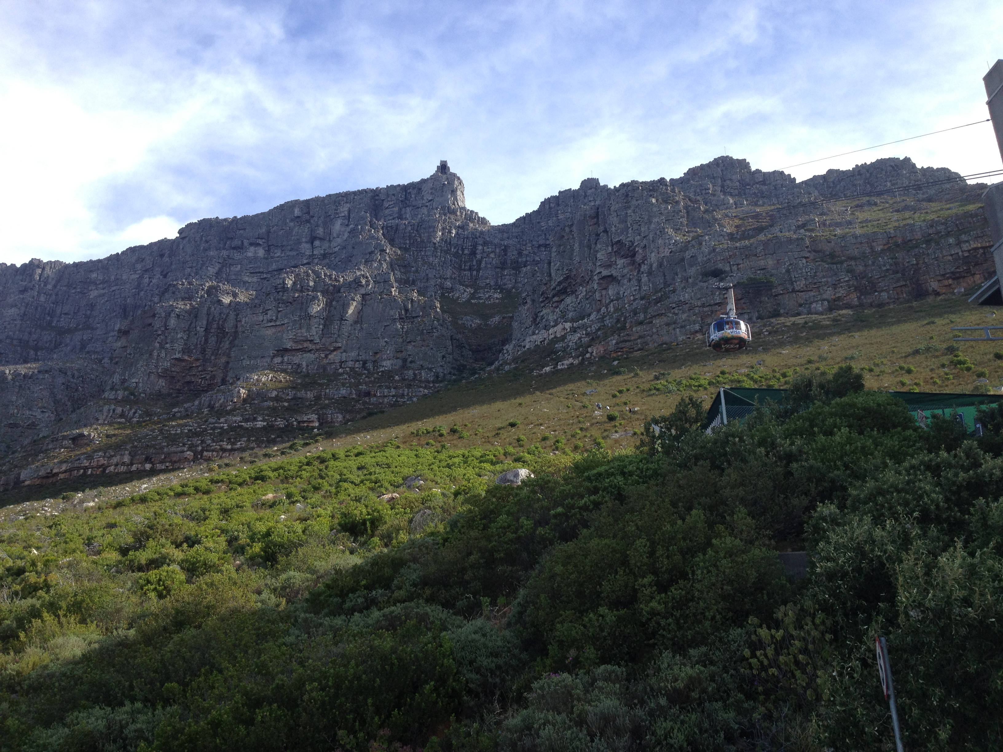 Masa Dağı'na teleferik ile tırmanmak mümkündür.